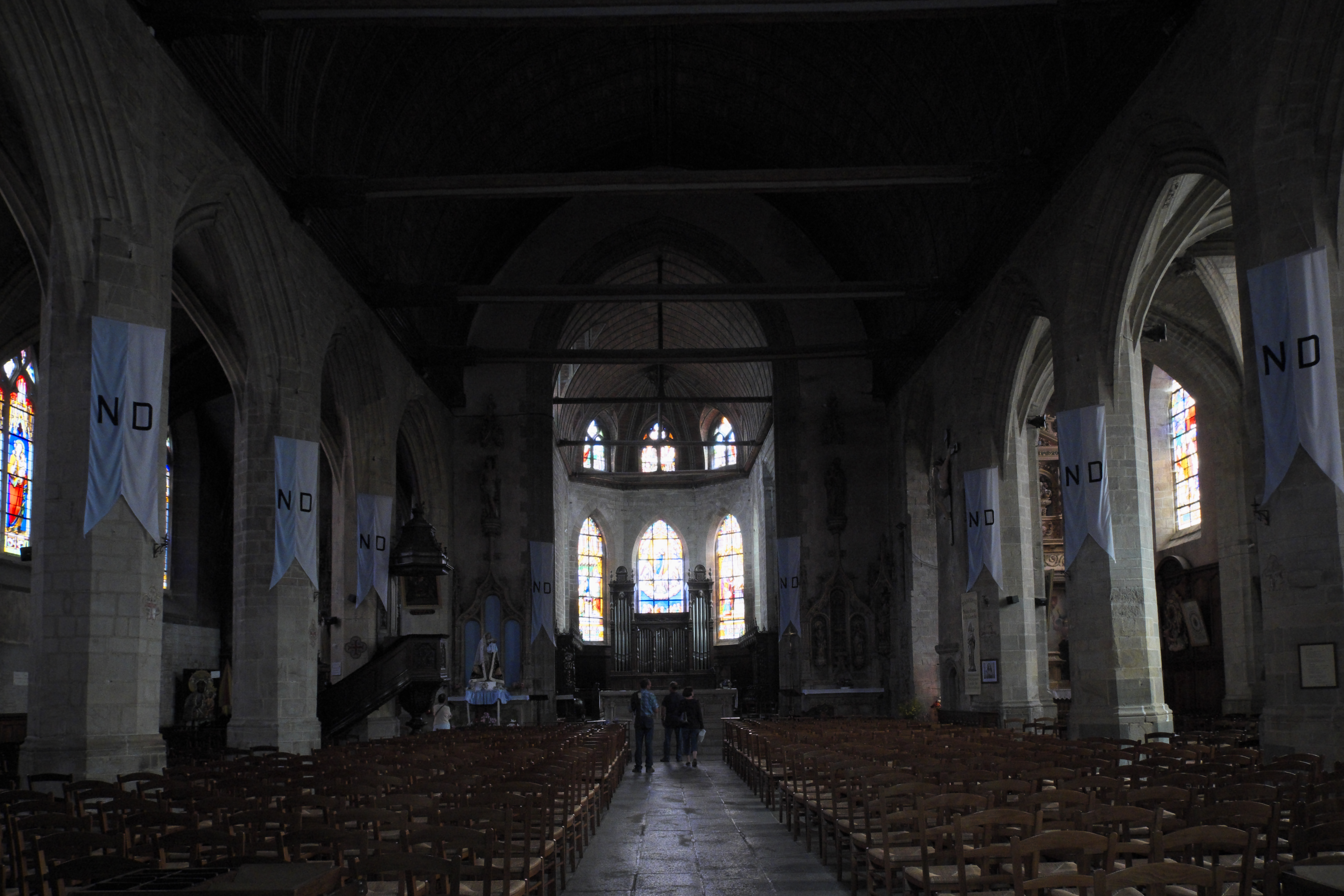 Basilika Notre-Dame-de-l'Assomption in La Guerche-de-Bretagne im Département Ille-et-Vilaine (Bretagne/Frankreich), Innenraum